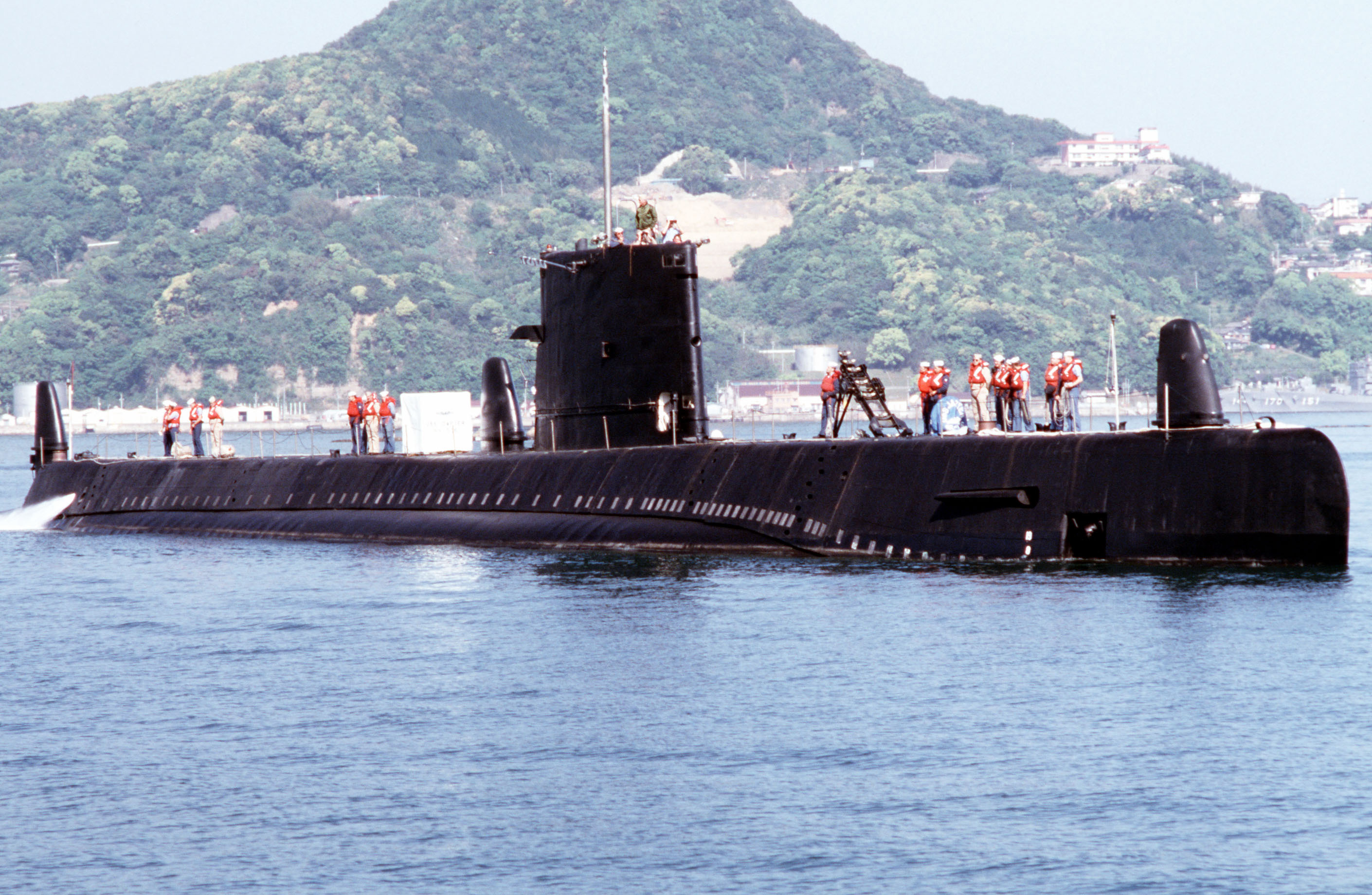 USS Darter (SS-576) na powierzchni